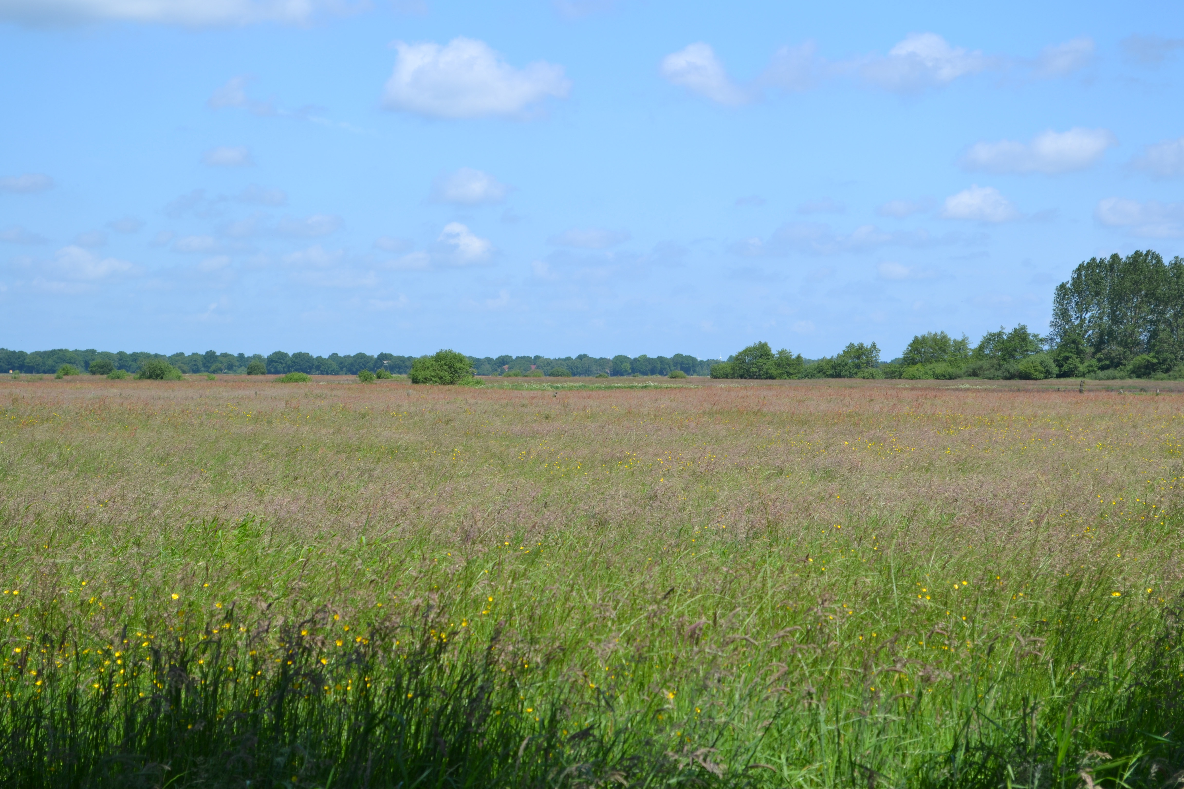 Naturschutzgebiet Flumm-Niederung, Großefehn, Landkreis Aurich, Niederung mit Feuchtwiesen